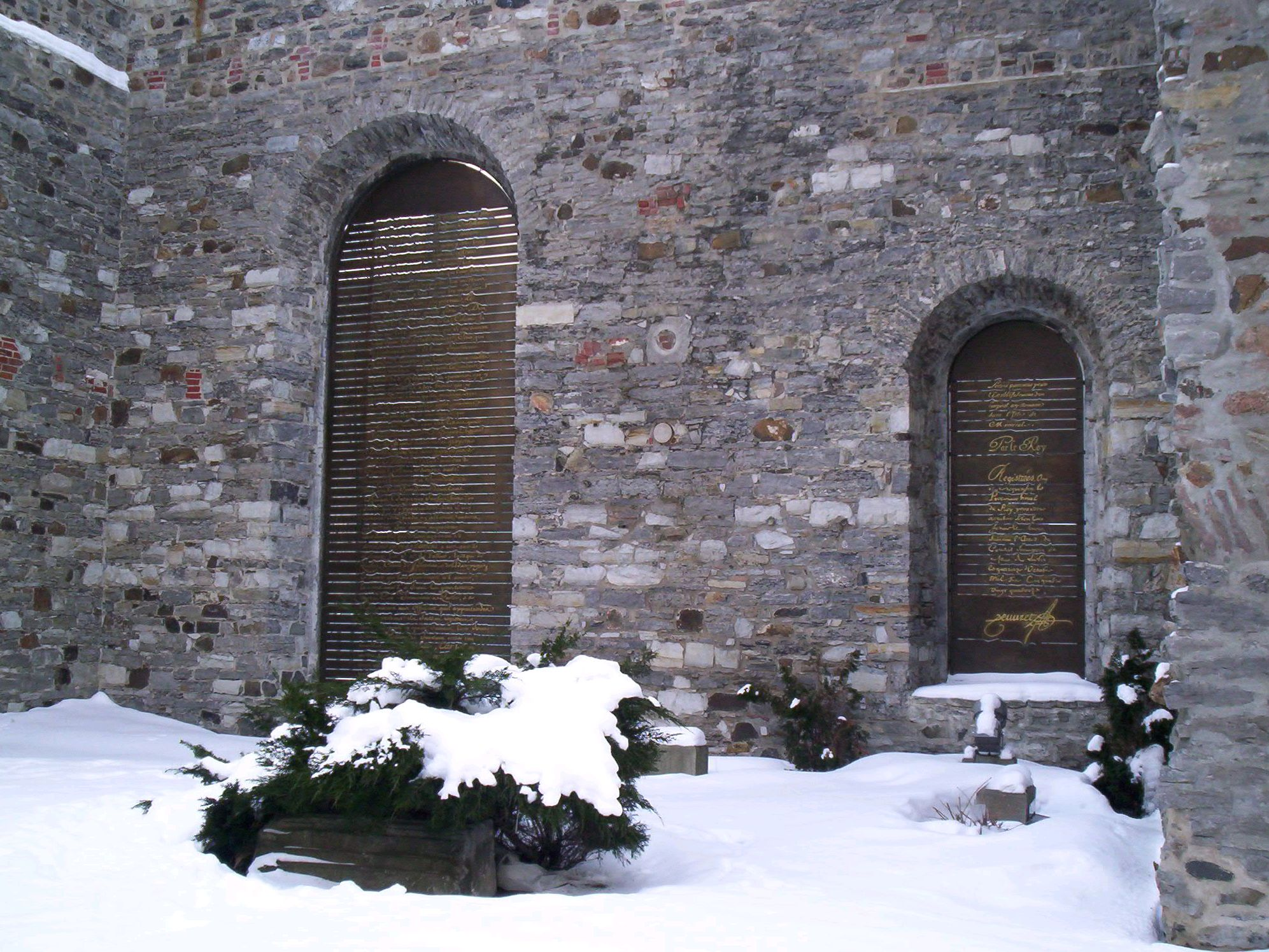 Mur de la chapelle de l'Ancien hôpital général de Montréal, rue Sait-Pierre.